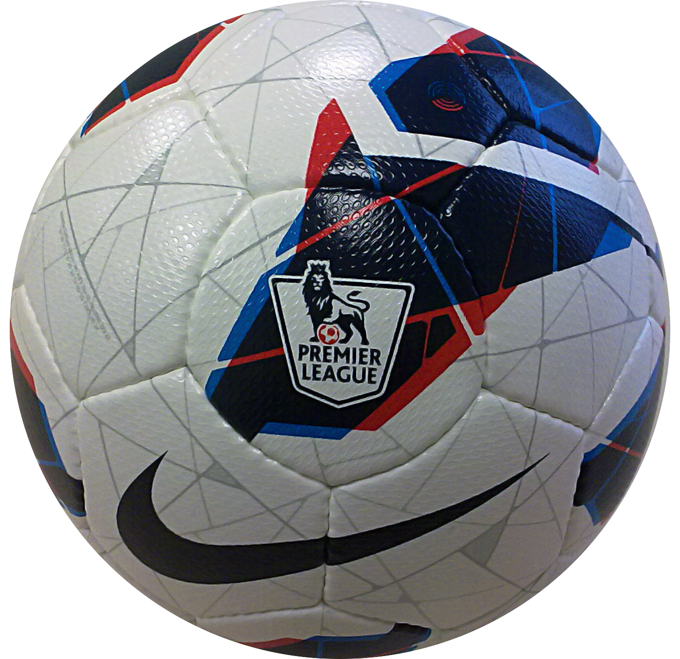 Nike Maxim - официальный футбольный мяч Чемпионата Англии (Премьер Лига) по футболу 2012/2013 года